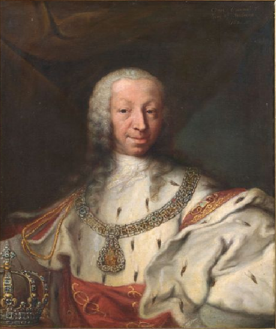 Ritratto a mezzo busto di Re Carlo Emanuele III di Savoia (1701-1773)